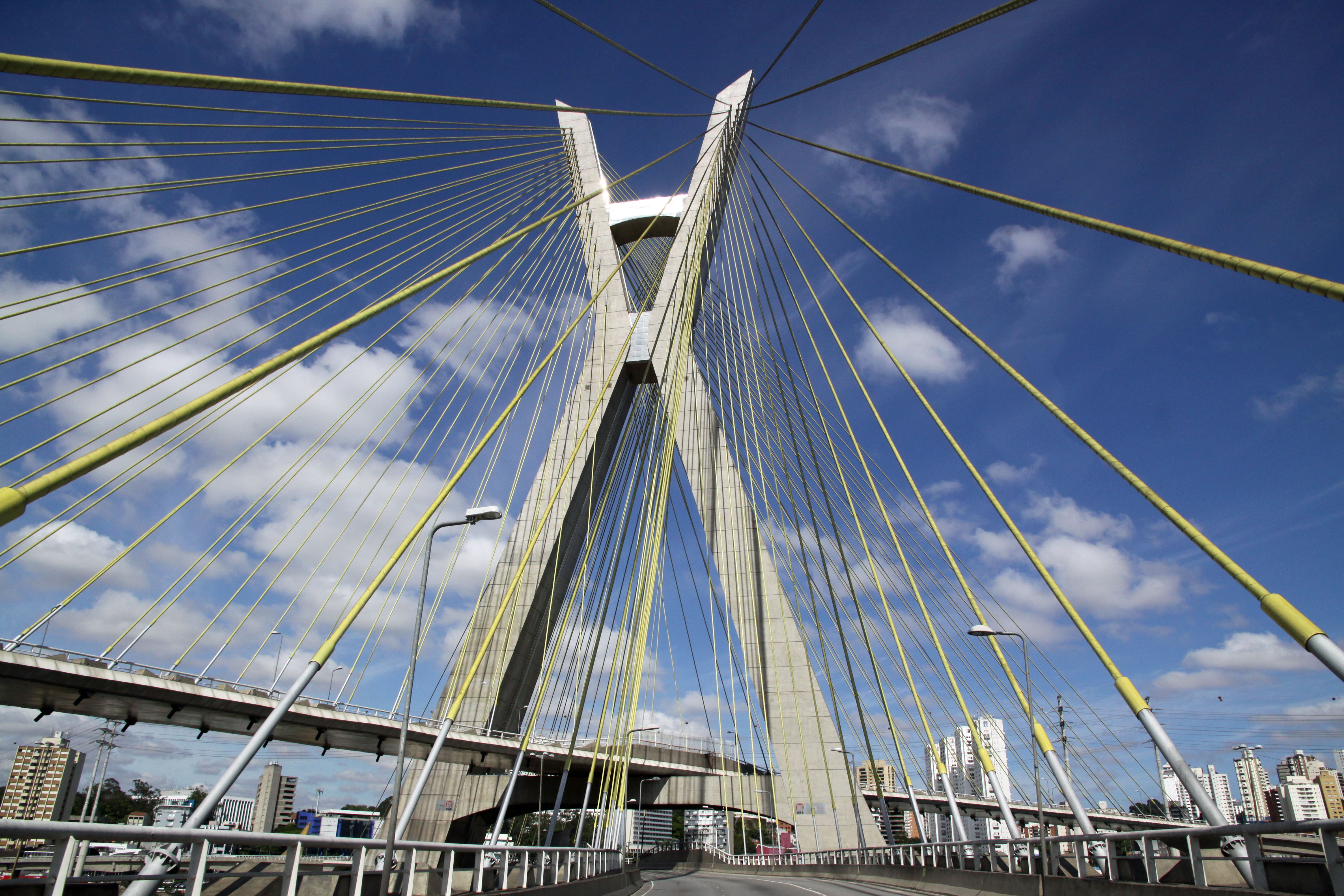 Ponte Estaiada Octávio Frias de Oliveira sobre o Rio Pinheiros em São Paulo, SP.